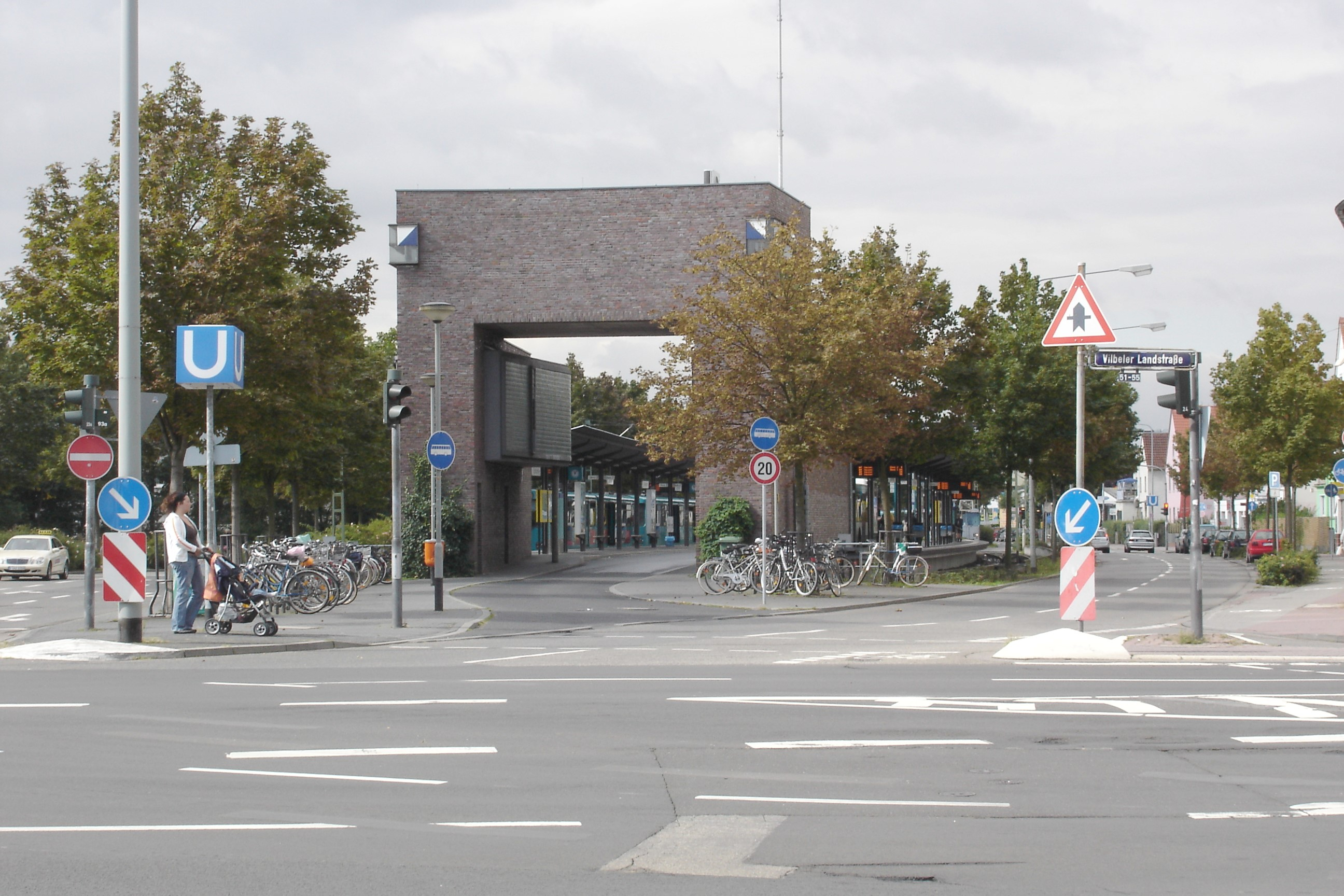 Endstation der U4 und U7, Enkheim, Borsigallee, mit Busbahnhof. Blick von der Vilbeler Landstrasse aus.